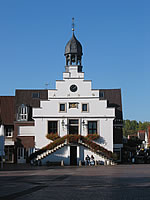 Lingener Rathaus